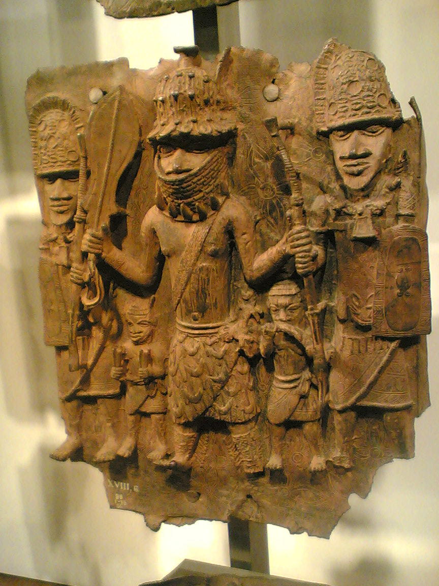 Benin Bronzes